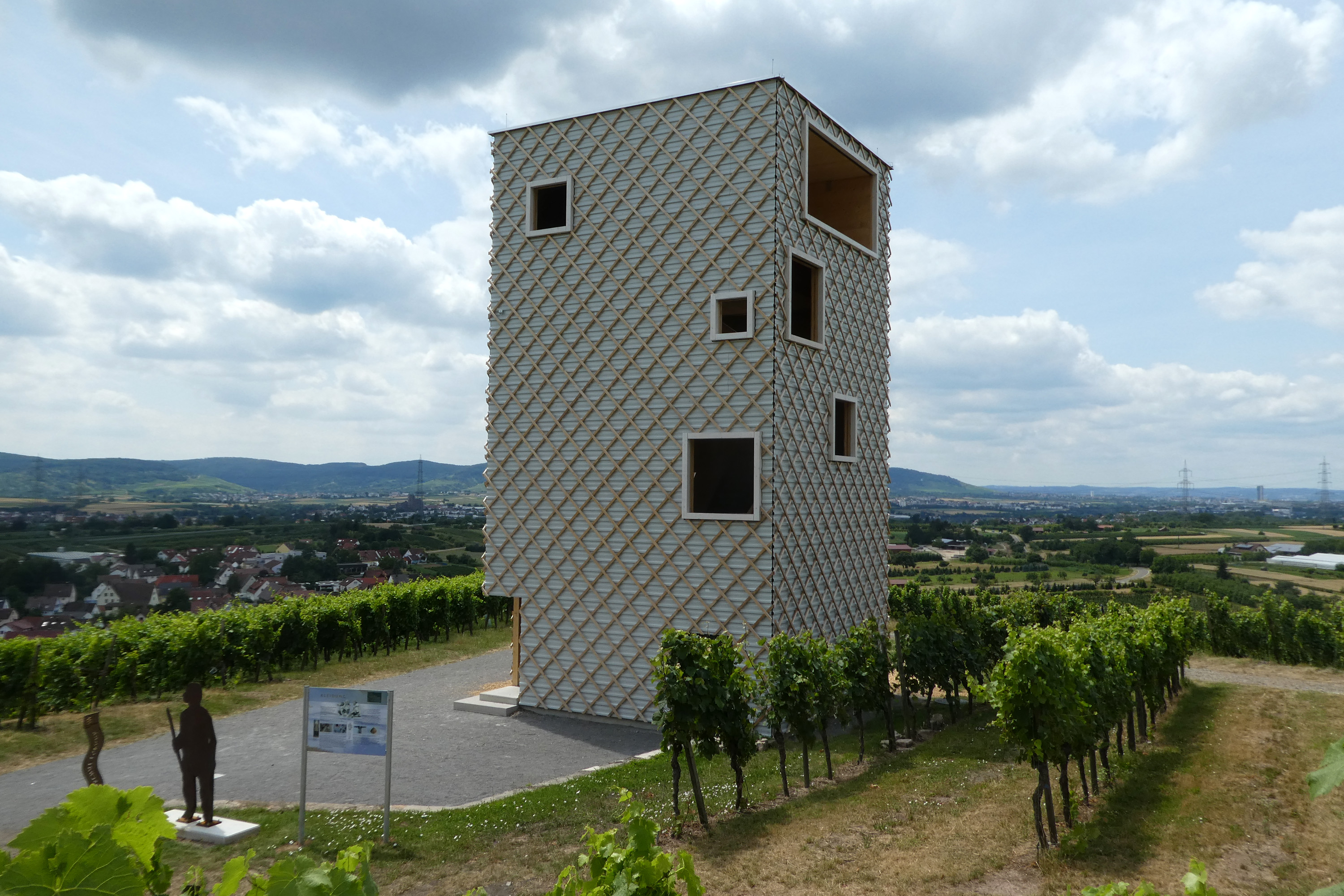 Korb - "Fernsehen in Korb". Das Bauwerk entstand als Station 12 der "16 Stationen" der Remstal-Gartenschau 2019.